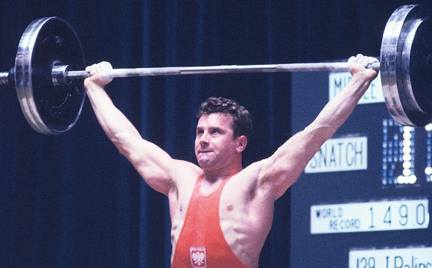 Ireneusz Paliński, 1964 Olympics